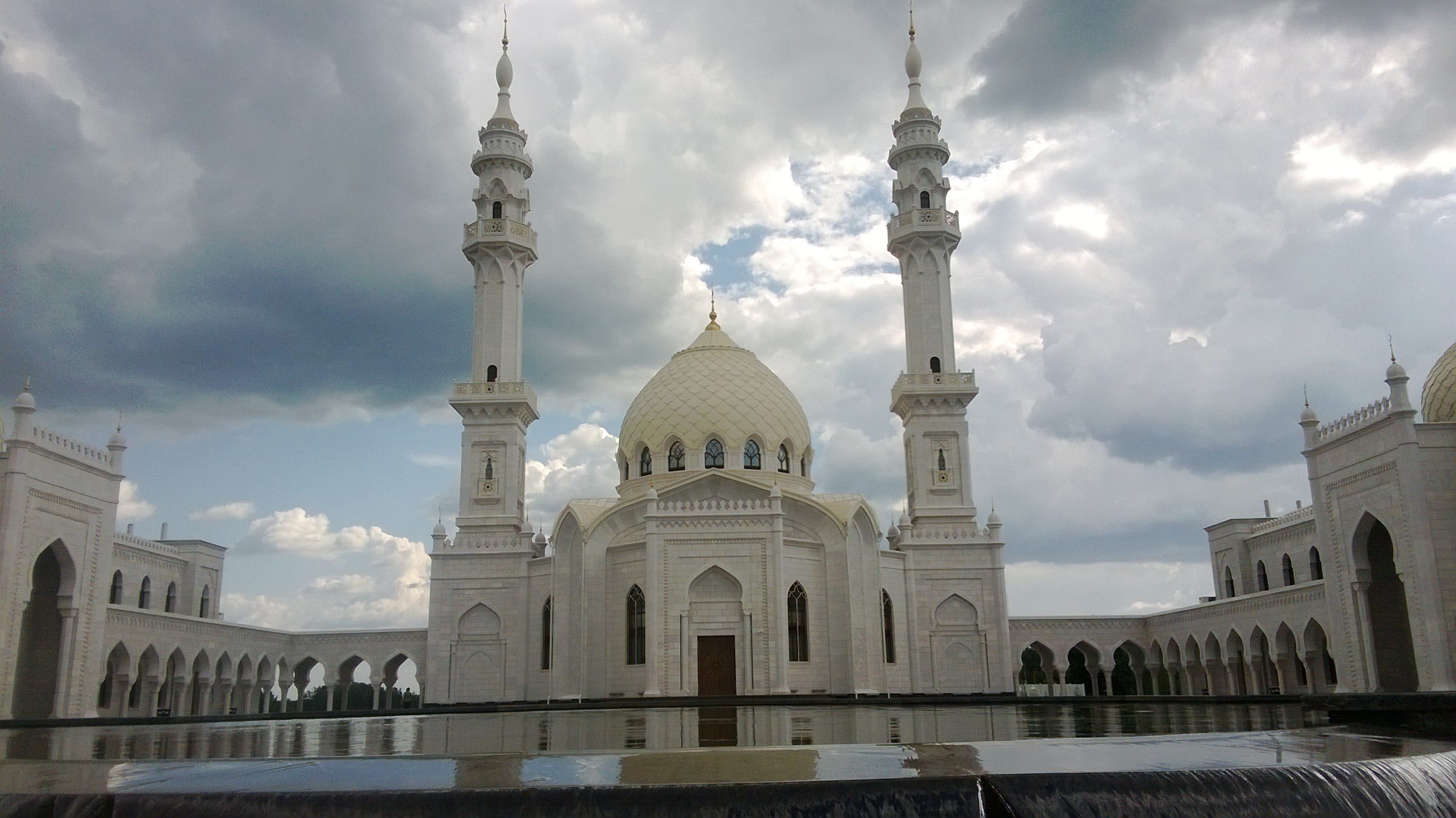 Белая мечеть, Болгар, Татарстан